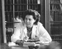 Factual corrections and alternative descriptions are encouraged separately from the original description. Additionally errors can be reported at this page to inform the Bundesarchiv. Original historic description: Leipzig, Universität, Besprechung Zentralbild Deutsche Demokratische Republik 30.1.1970 Hn.Professor Lykke Aresin- Wissenschaftlerin und Abgeordnete Mehr als 52000 Frauen sind in der DDR als gewählte Volksvertreter in den verschiedensten Funktionen tätig. In jedem Gemeinderat, Stadtrat, in der Bezirksverordnetenversammlung bis hin zur Volkskammer der DDR sind Frauen würdige Vertreter des Volkes. Zu ihnen gehört auch Frau Professor Lykke Aresin, Wissenschaftlerin und Abgeordnete. Seminare für Medizinstudenten an der Leipziger Karl-Marx-Universität zu leiten (u.Foto), ist nur eine der vielen verantwortungsvollen Aufgaben, die Frau Professor Aresin erfüllt. Neben ihrer pädagogischen und wissenschaftlichen Tätigkeit, Frau Professor Aresin befaßt sich an der Frauenklinik der Universität vor allem mit Grenzproblemen, die die Fachgebiete Neurologie, Psychiatrie, Geburtshilfe und Frauenheilkunde berühren, ist sie als Stadtverordnete, als Vorsitzende des Frauenausschusses der Medizinischen Fakultät und in anderen gesellschaftlichen Funktionen wirksam. Als Leiterin des Aktivs "Mutter und Kind" der Ständigen Kommission Gesundheits und Sozialwesen betreut Professor Aresin u.a. Kinderkrippen in Leipzig. Vielen ist die Wissenschaftlerin auch durch die erfolgreiche Arbeit der Familienberatungsstelle in Leipzig bekannt. Sie ist Mitglied der Fakultätsgewerkschaftsleitung und Mitglied des Elternaktivs. Foto: Raphael Copyright: ADN-Zentralbild Abgebildete Personen: Aresin, Lykke Prof. Dr. med.: Nervenärztin an der Universitätsfrauenklinik Leipzig, DDR (GND 104619295)